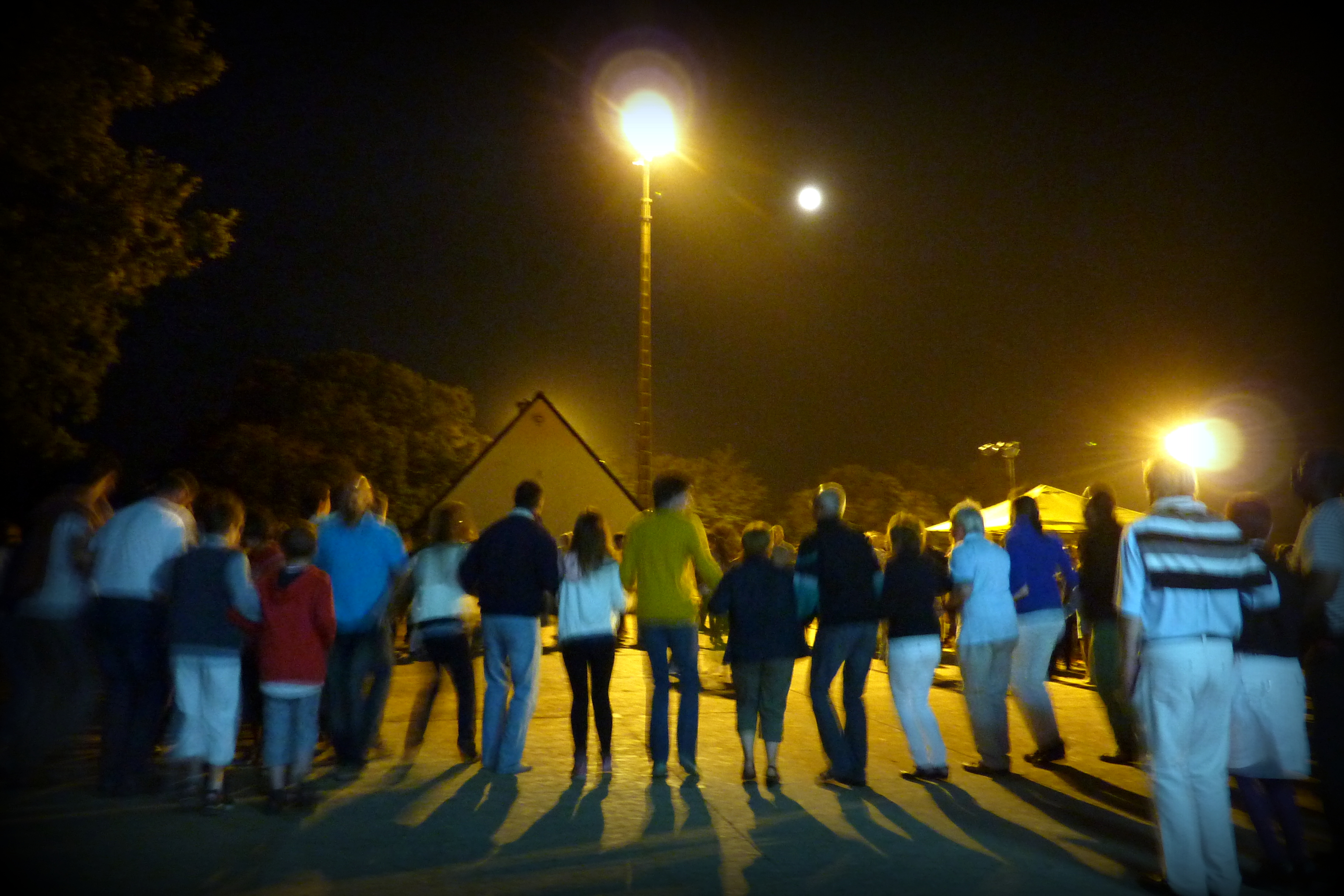 Fest Noz à Saint-Quay-Perros le 21 juillet 2013.